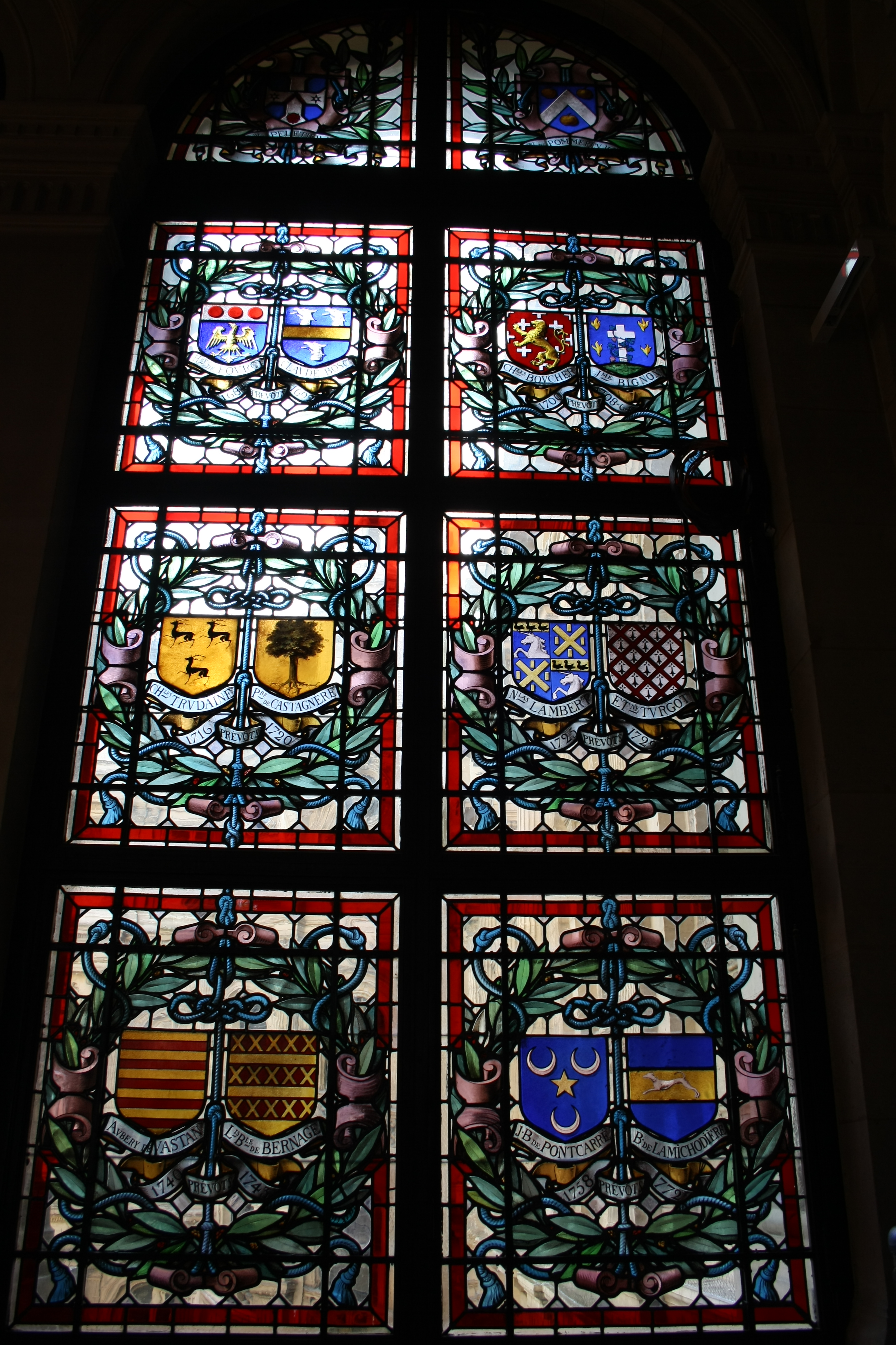 Bleiglasfenster im Rathaus von Paris (4. Arrondissement), "galerie du conseil", Darstellung: Wappen der Prévôt de Paris